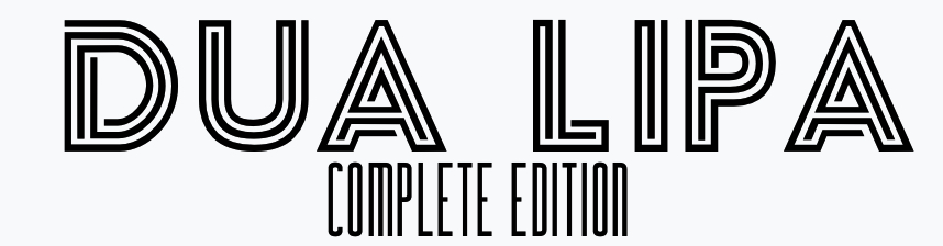 Cover improvisada de la reedición Dua Lipa